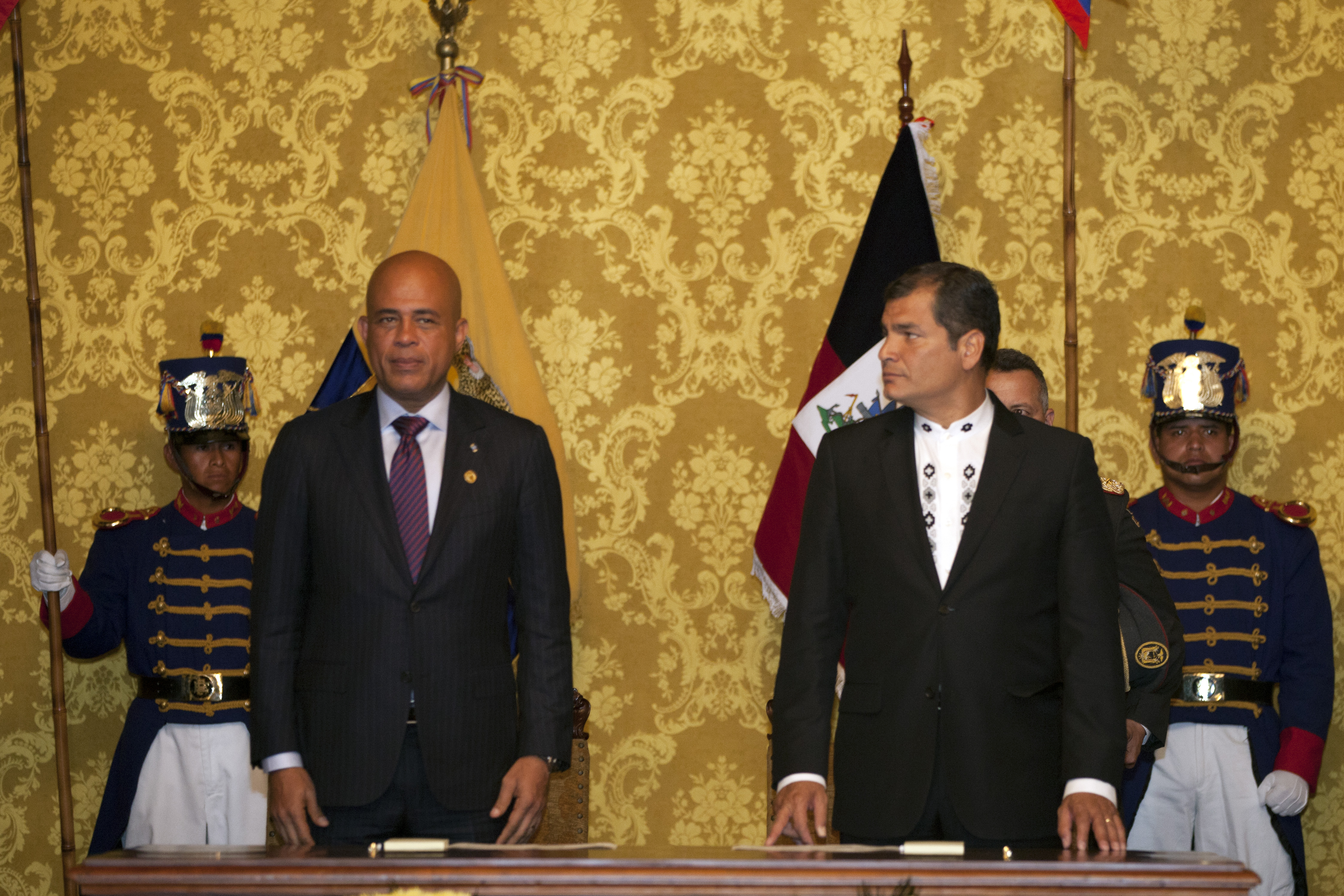 Quito (Ecuador), 11 de Julio 2012. Los Presidentes de Haití y Ecuador, Michel Martelly y Rafael Correa, ofrecieron una rueda de prensa. Además se firmaron convenios entre Haití y Ecuador. Foto: Fernanda LeMarie - Ministerio de Relaciones Exteriores, Comercio e Integración.